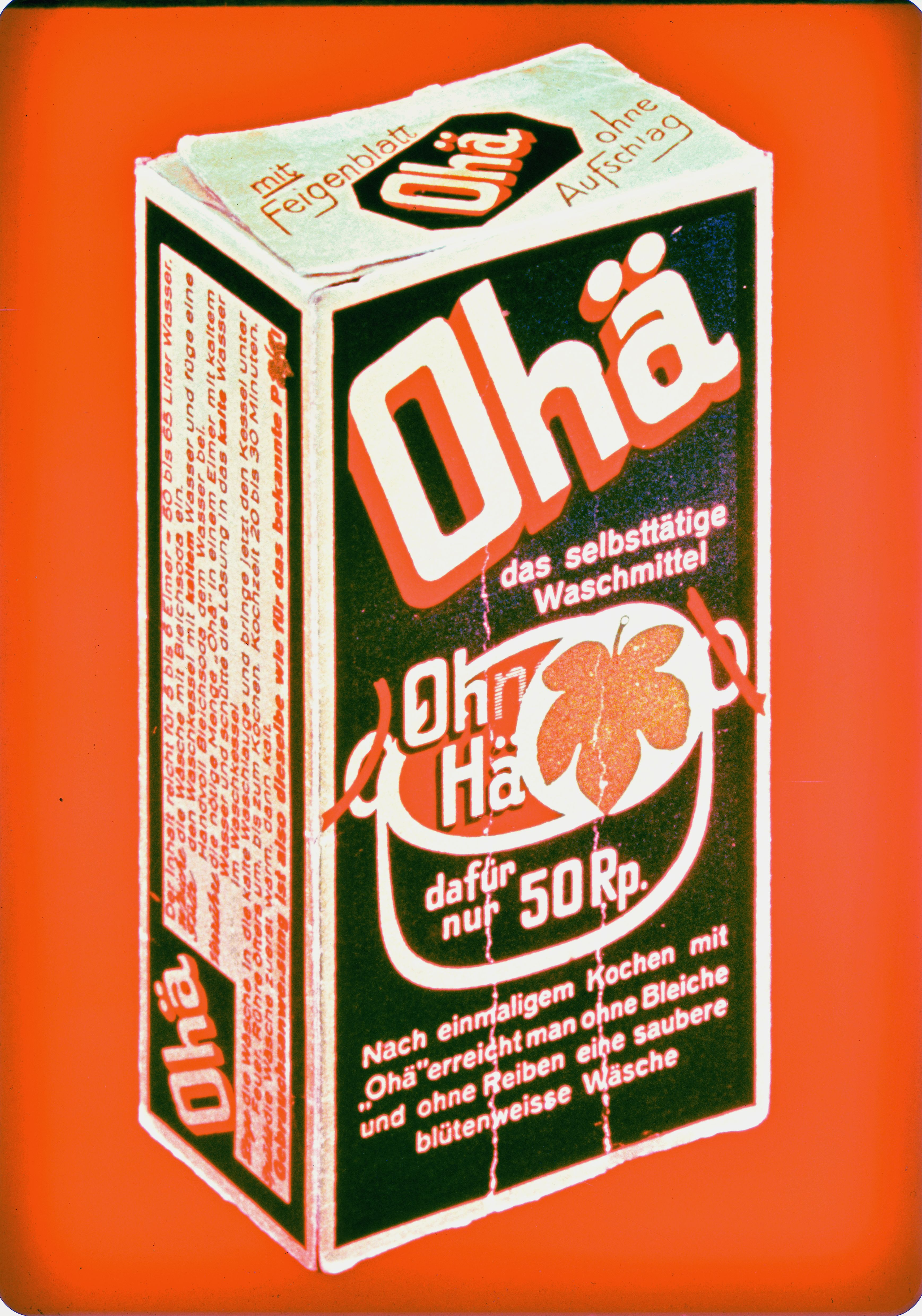 Migros-Produkteverpackung Ohä-Waschmittel mit Feigenblatt